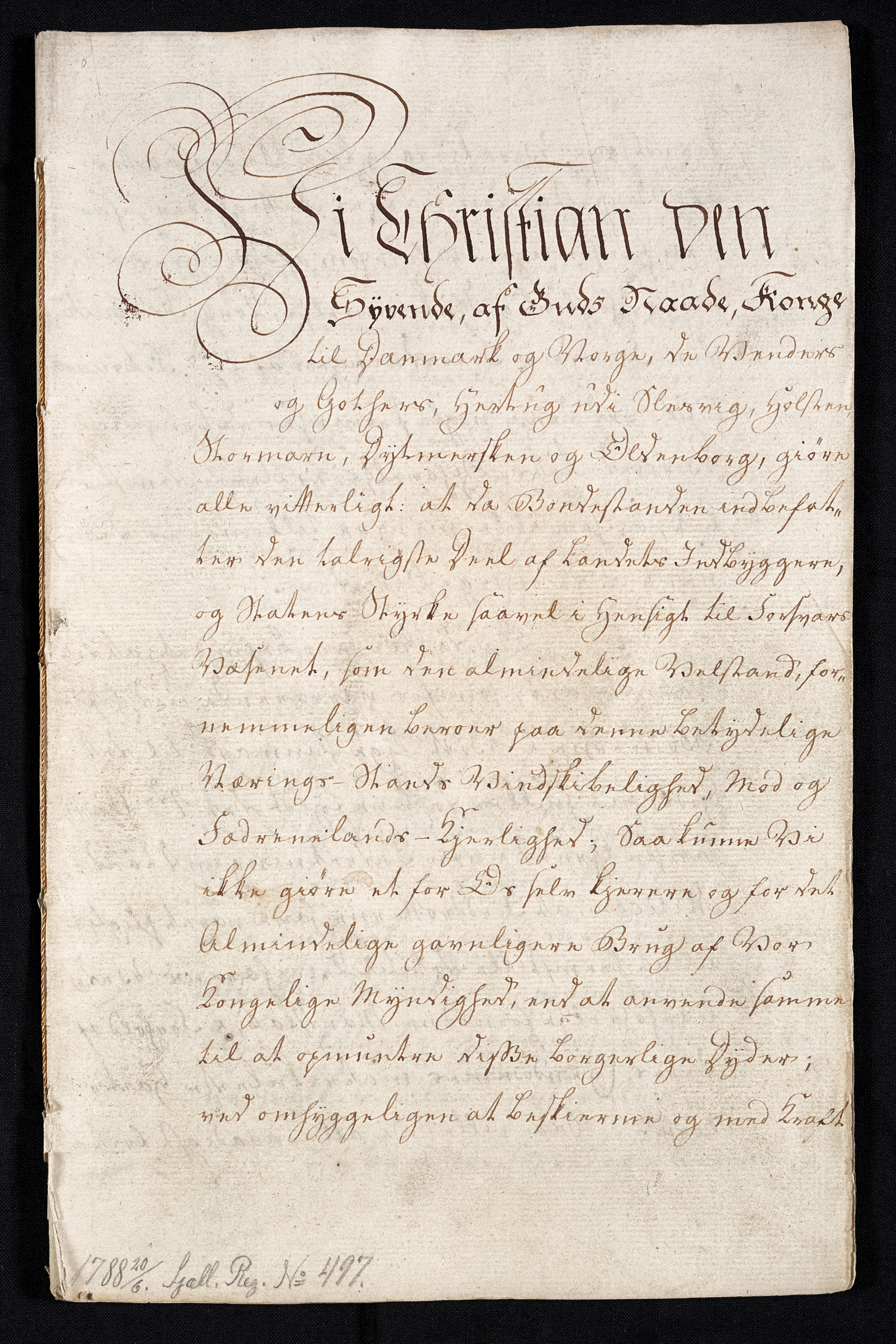 Stavnsbåndet ophæves, 20. juni 1788. Billedet viser forsiden på dokumentet.